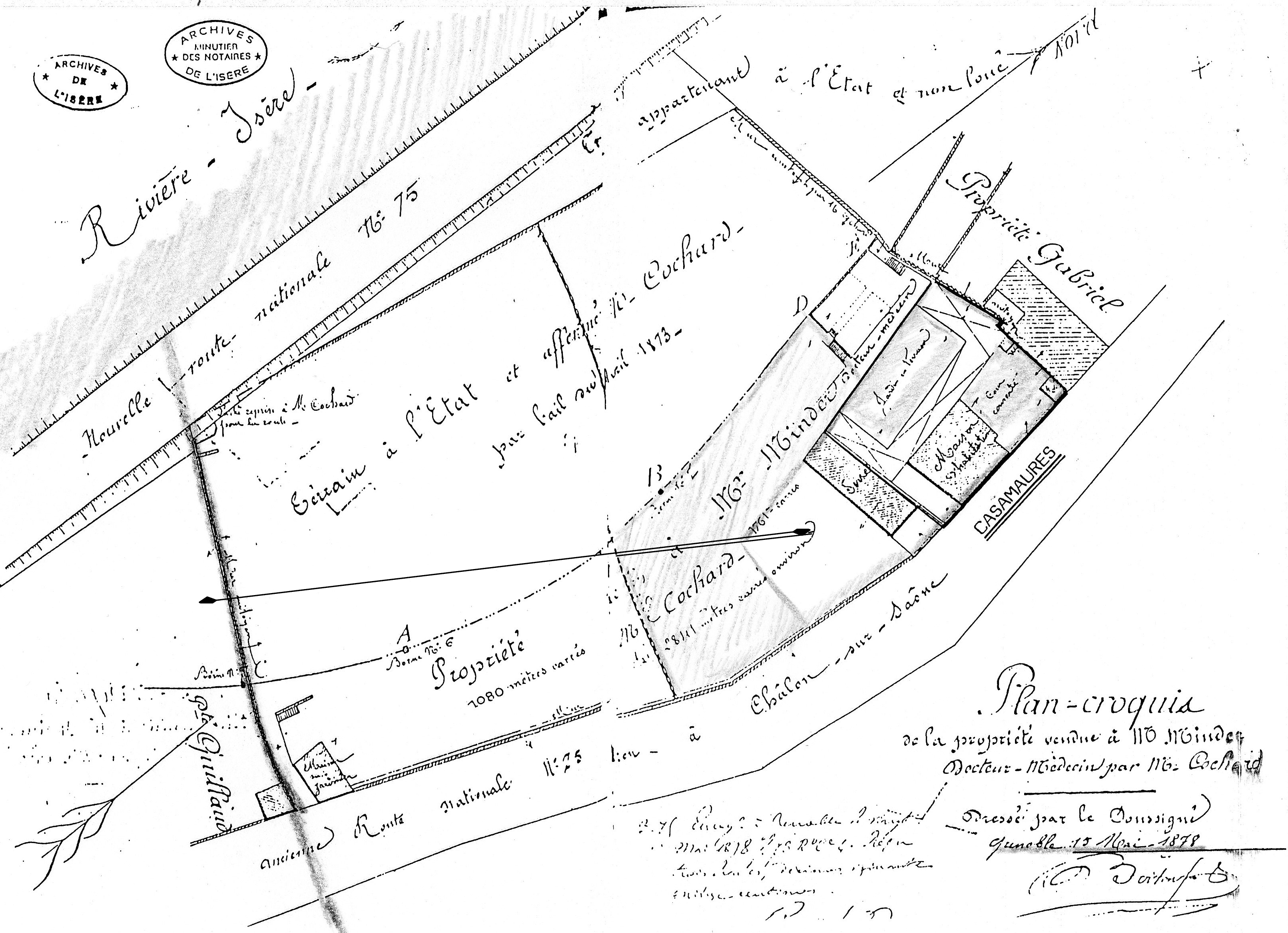 Plan-croquis de la propriété Guinguette en 1878, à Saint-Martin-le-Vinoux, où a été bâtie la Casamaures, monument historique de l'Isère.